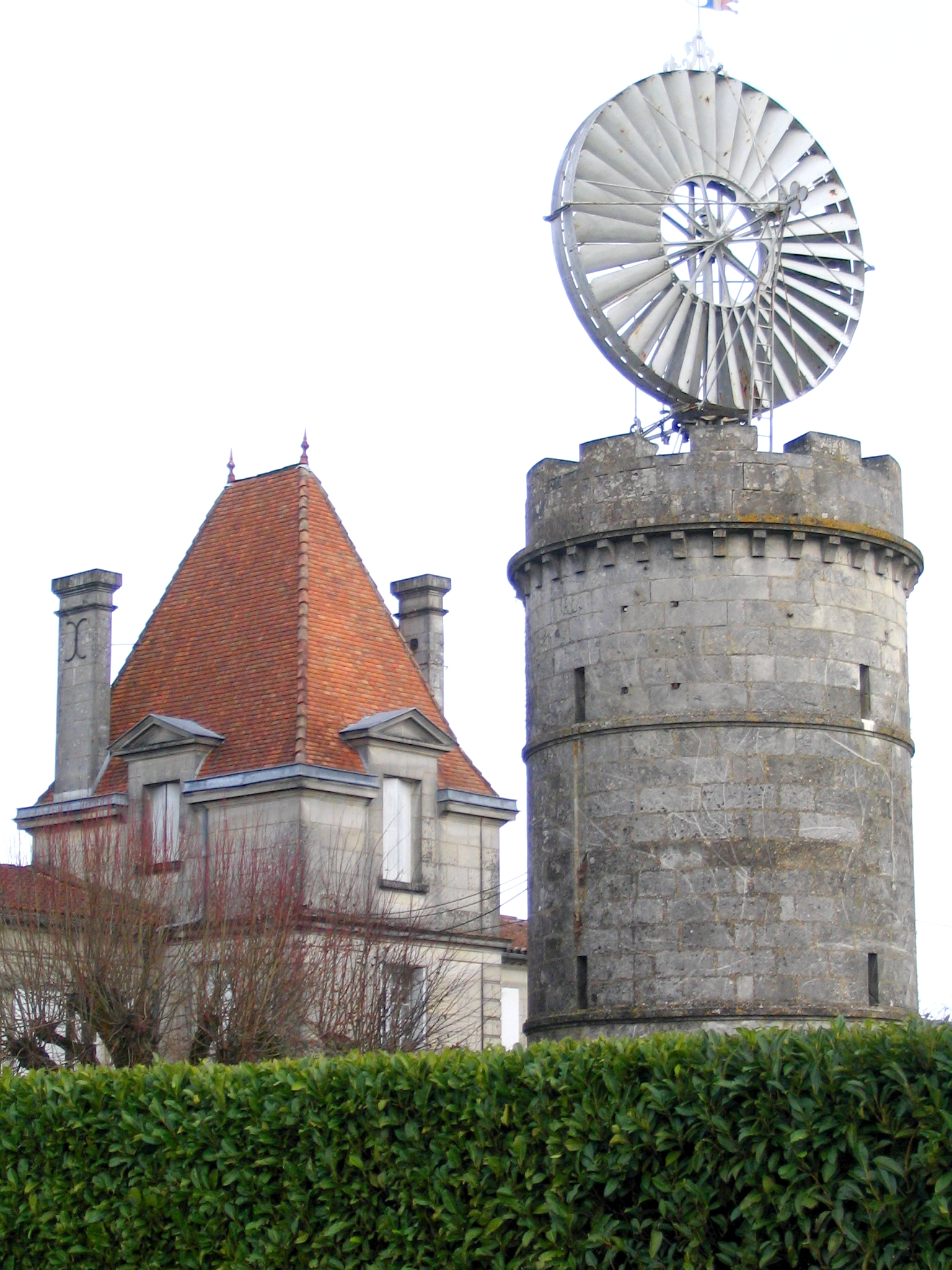 Eolienne sur son chateau d'eau, lieu-dit "Le Clône", Région de Pons - Ingénieur : E. Lebert, 1902 - Charente-Maritime - France .